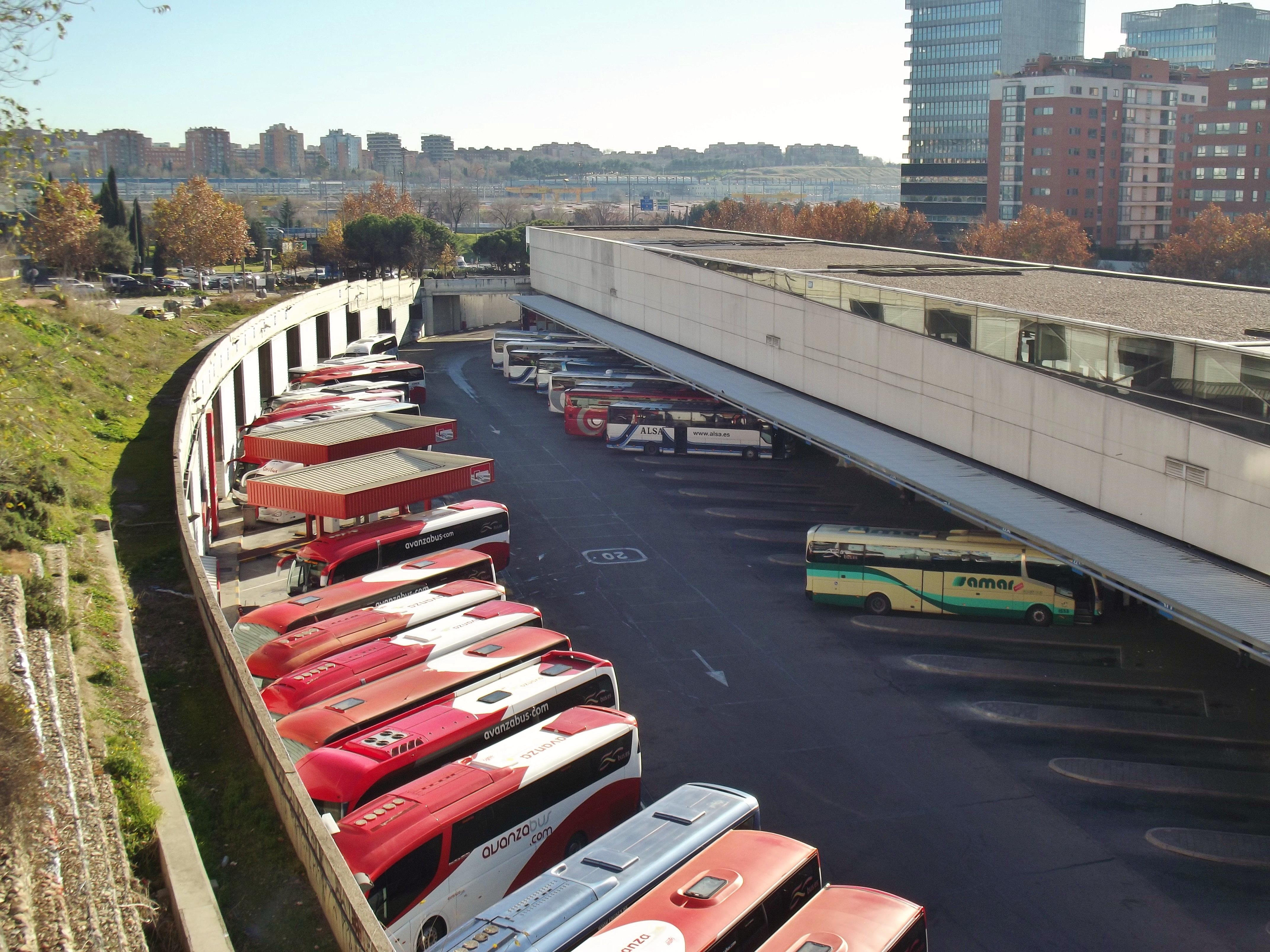 Vista de la Estación Sur de Autobuses (Madrid).